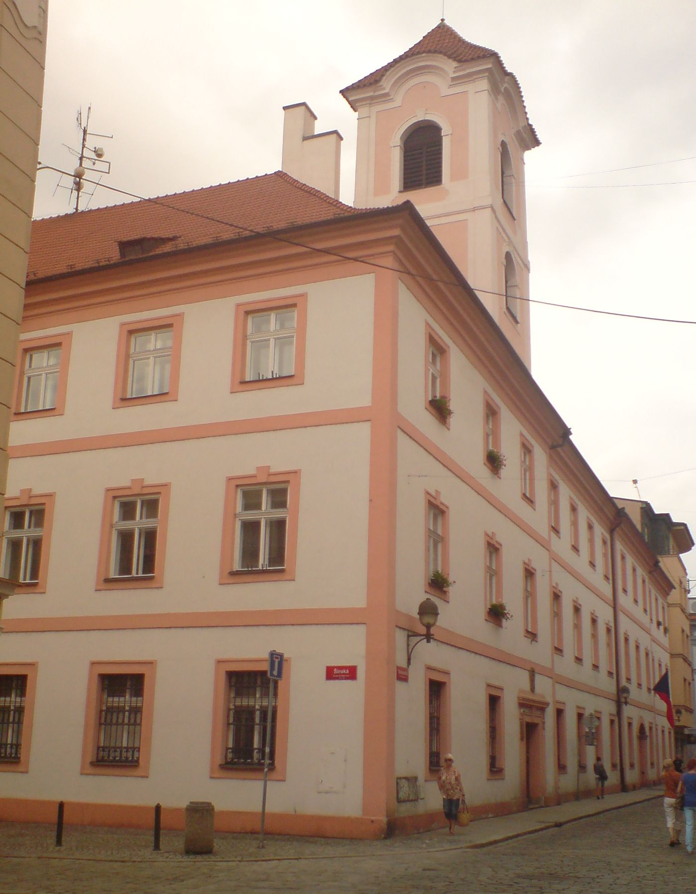 biskupství, Biskupská 132/4, České Budějovice